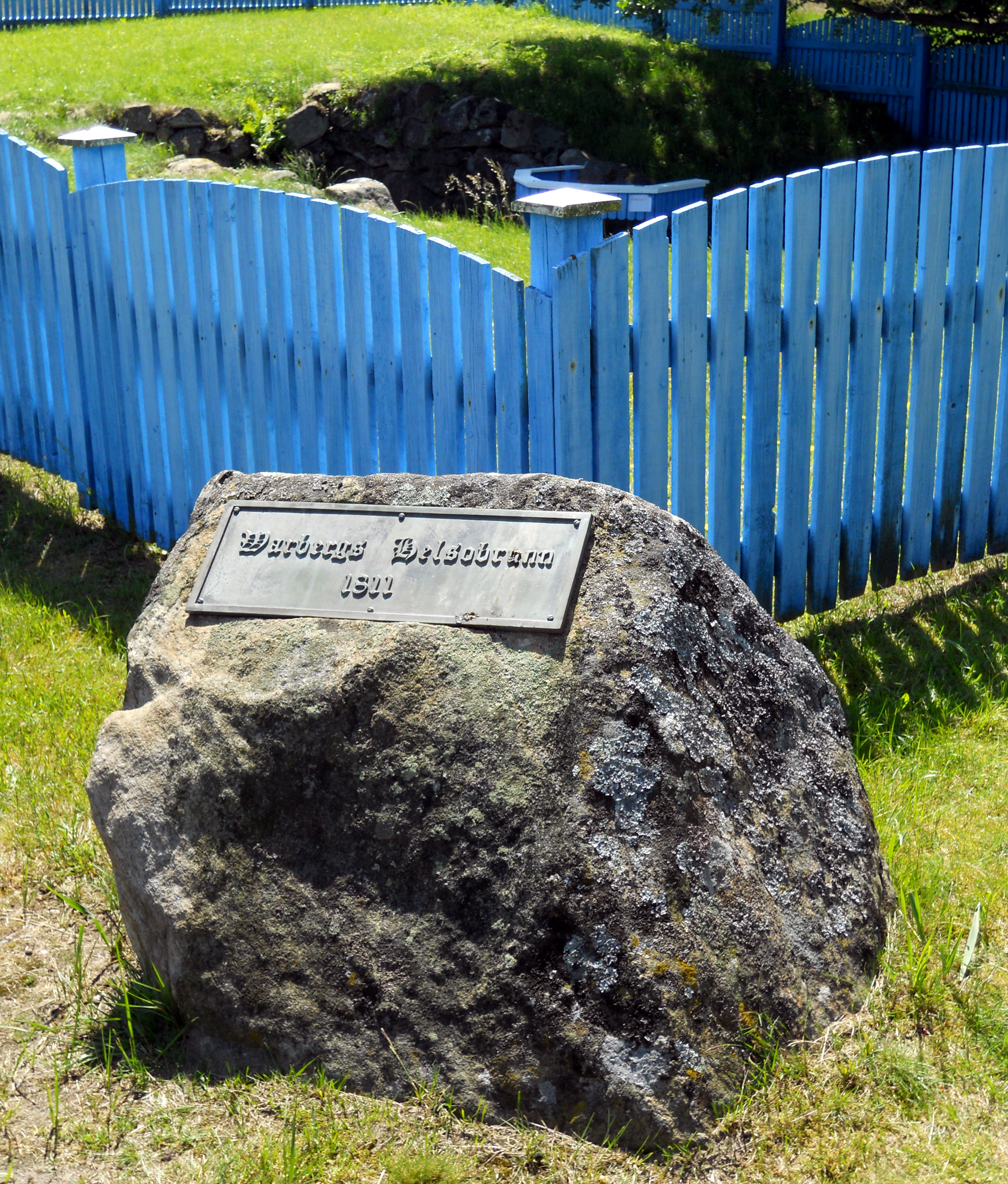 "Warbergs Helsobrunn 1811", skylt vid Svartekällan i Varberg.